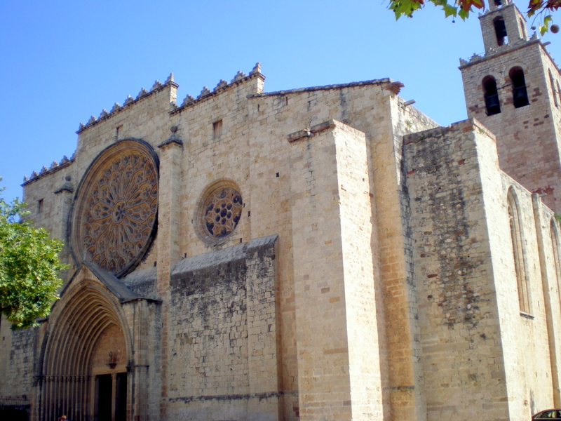 Monestir de Sant Cugat (Sant Cugat del Vallès)